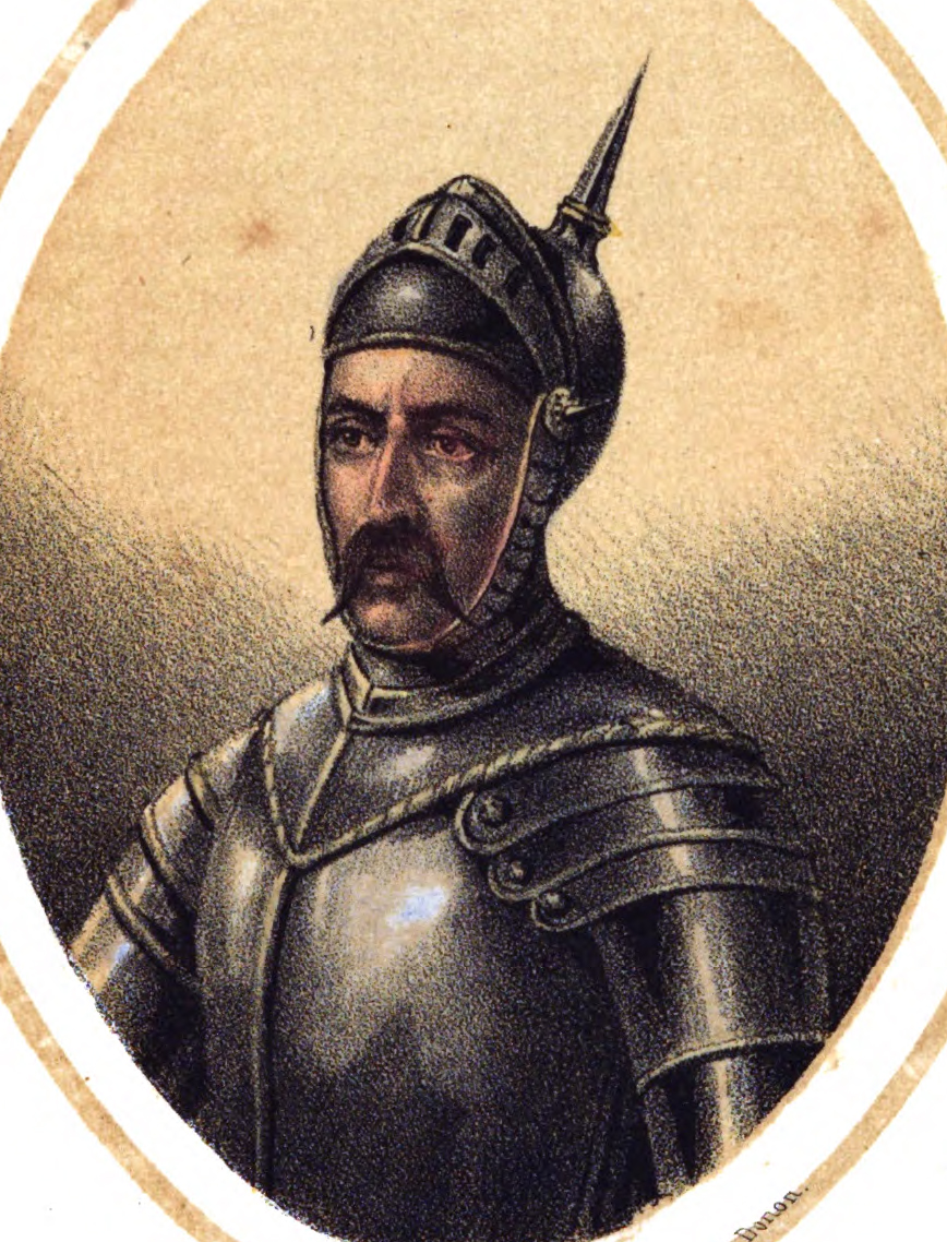 Pedro Ayala.